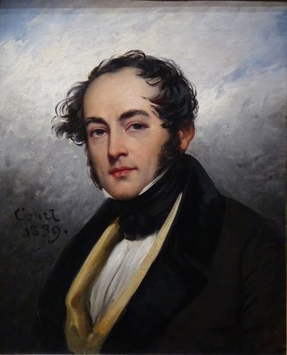 Huile sur toile - 62 x 50,5 cm Paris, Musée Carnavalet Photo : Didier Rykner